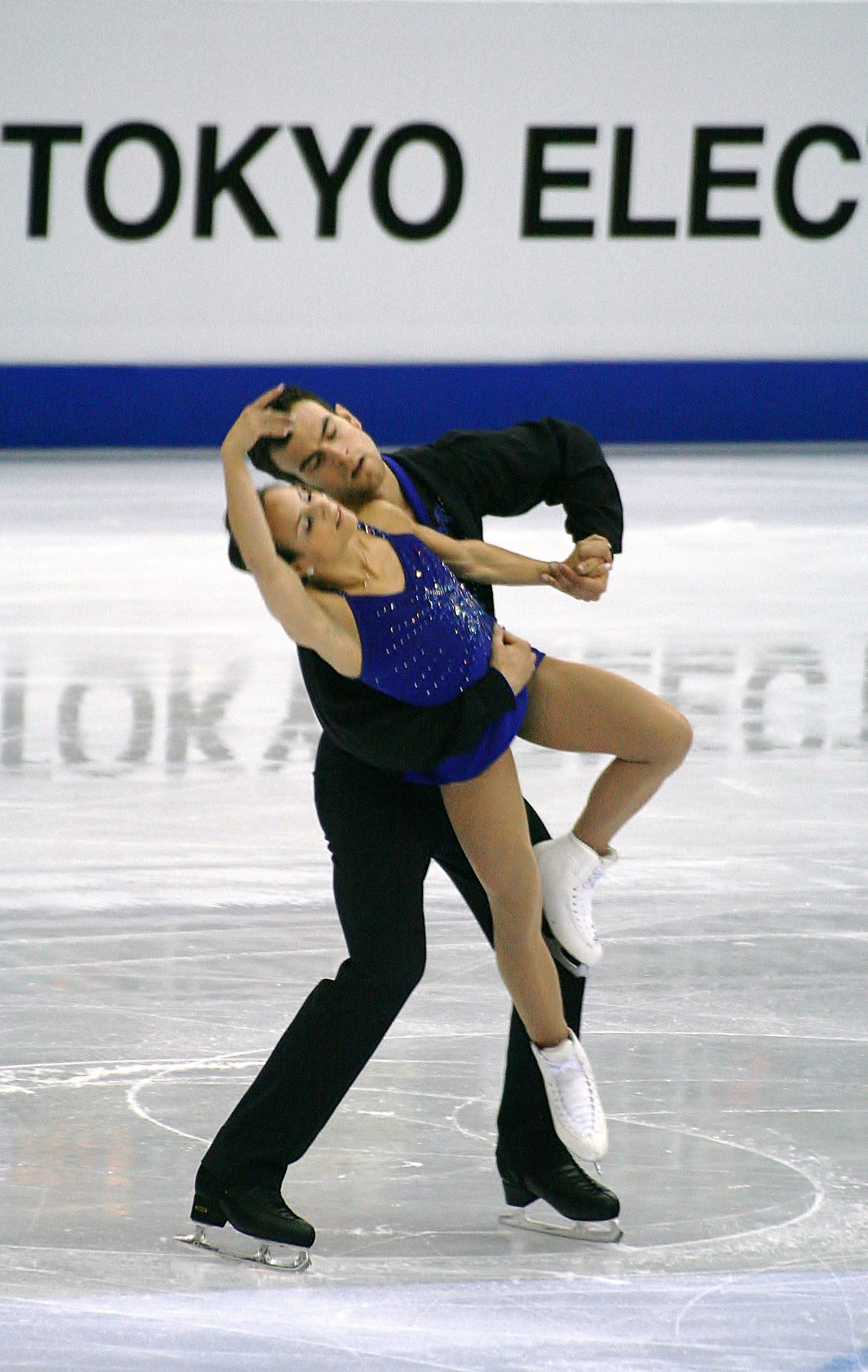 Мэган Дюамель и Эрик Редфорд (Канада) на чемпионате мира по фигурному катанию 2012